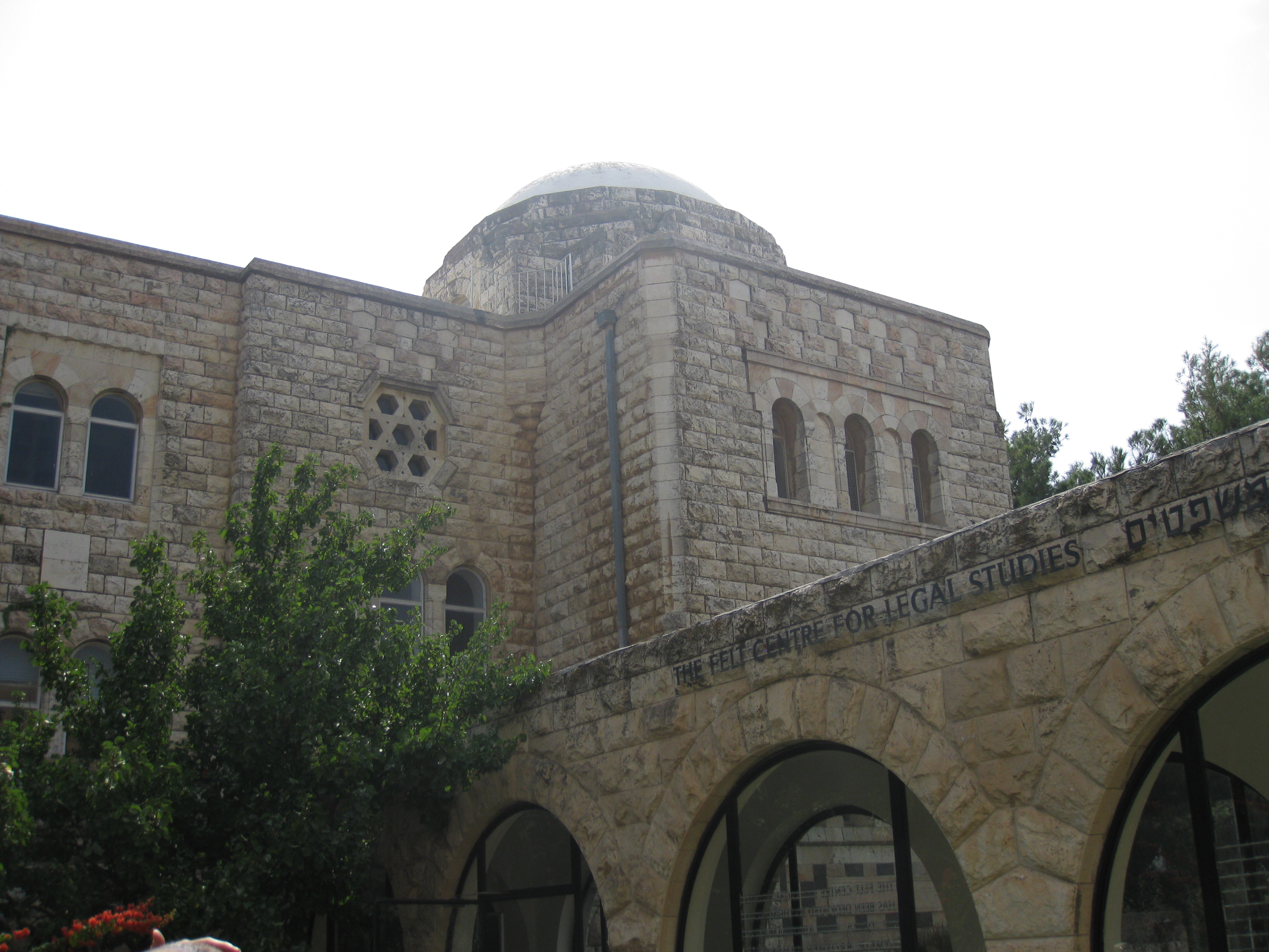 Mount Scopus הר הצופים